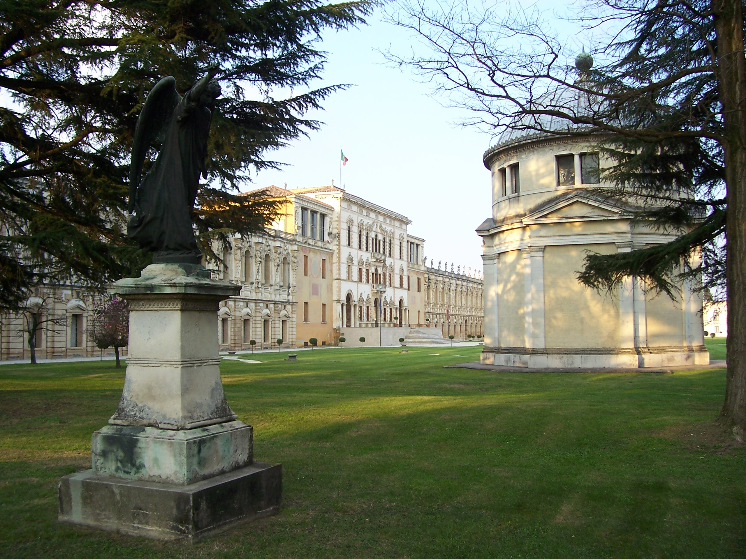 Villa Contarini vista dal giarndino